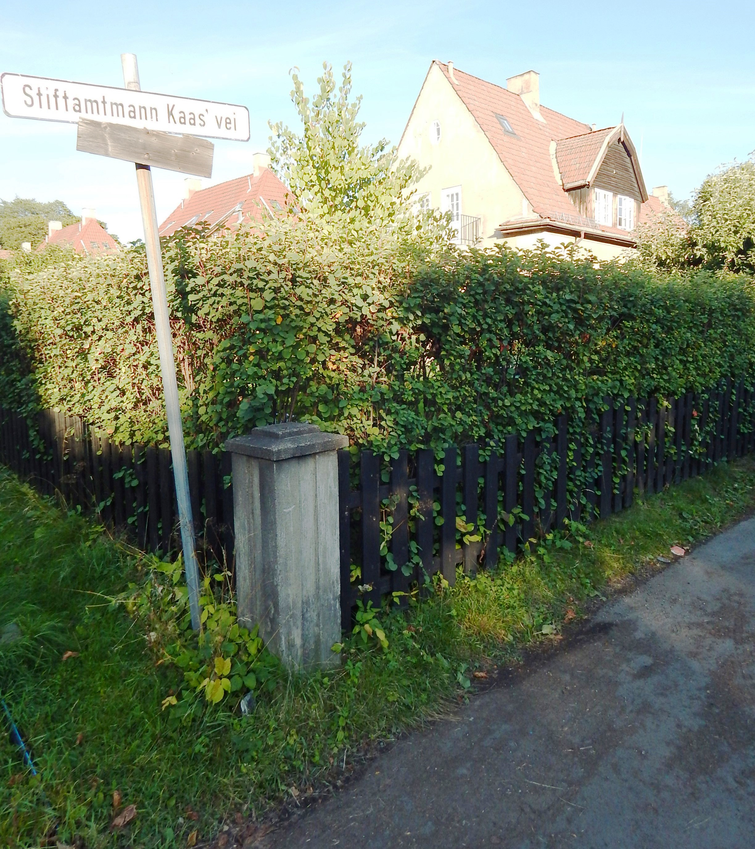 Stiftamtmann Kaas' vei